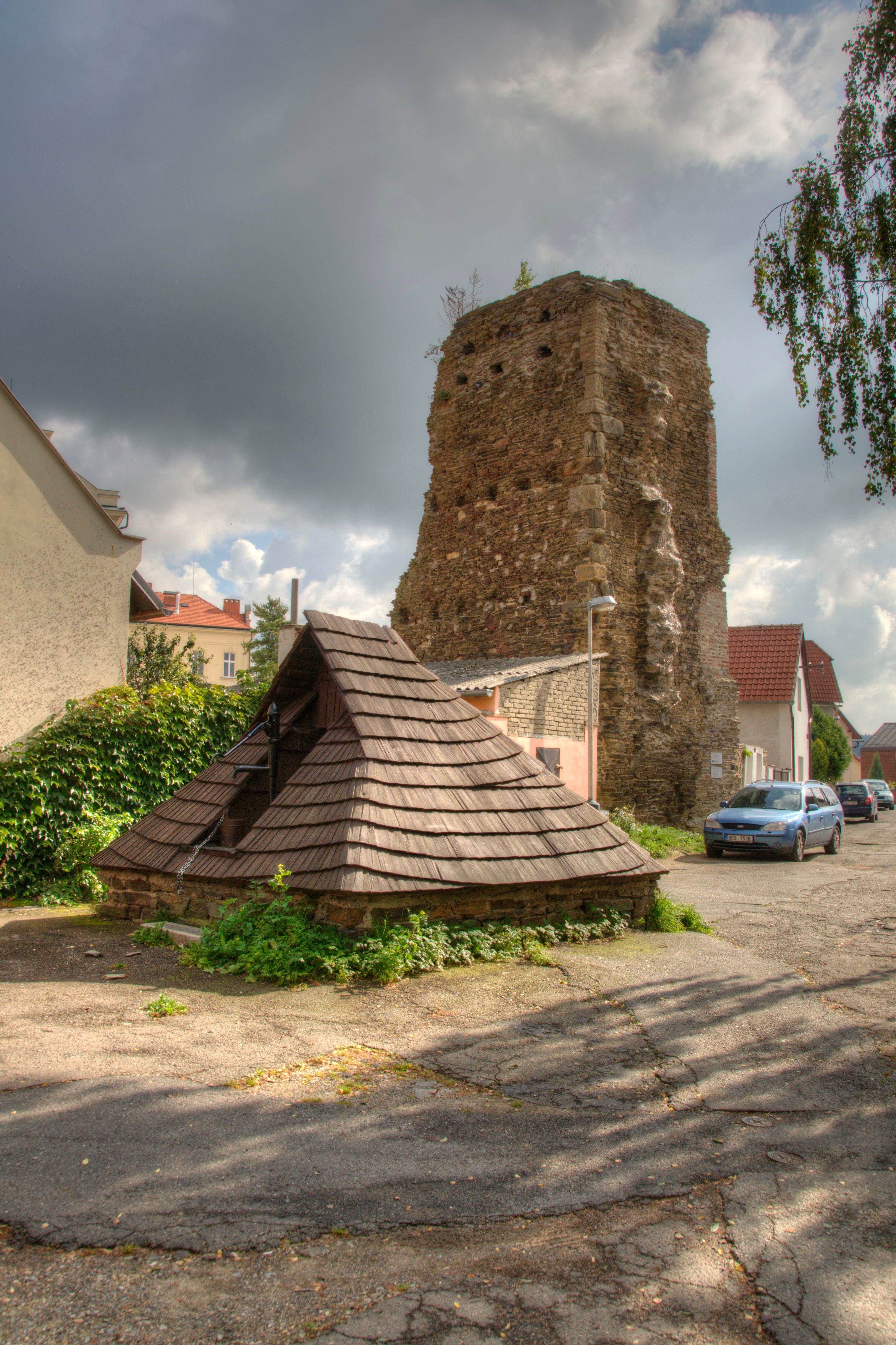 Říčany, zastřešená studna a torzo hradní věže od severozápadu